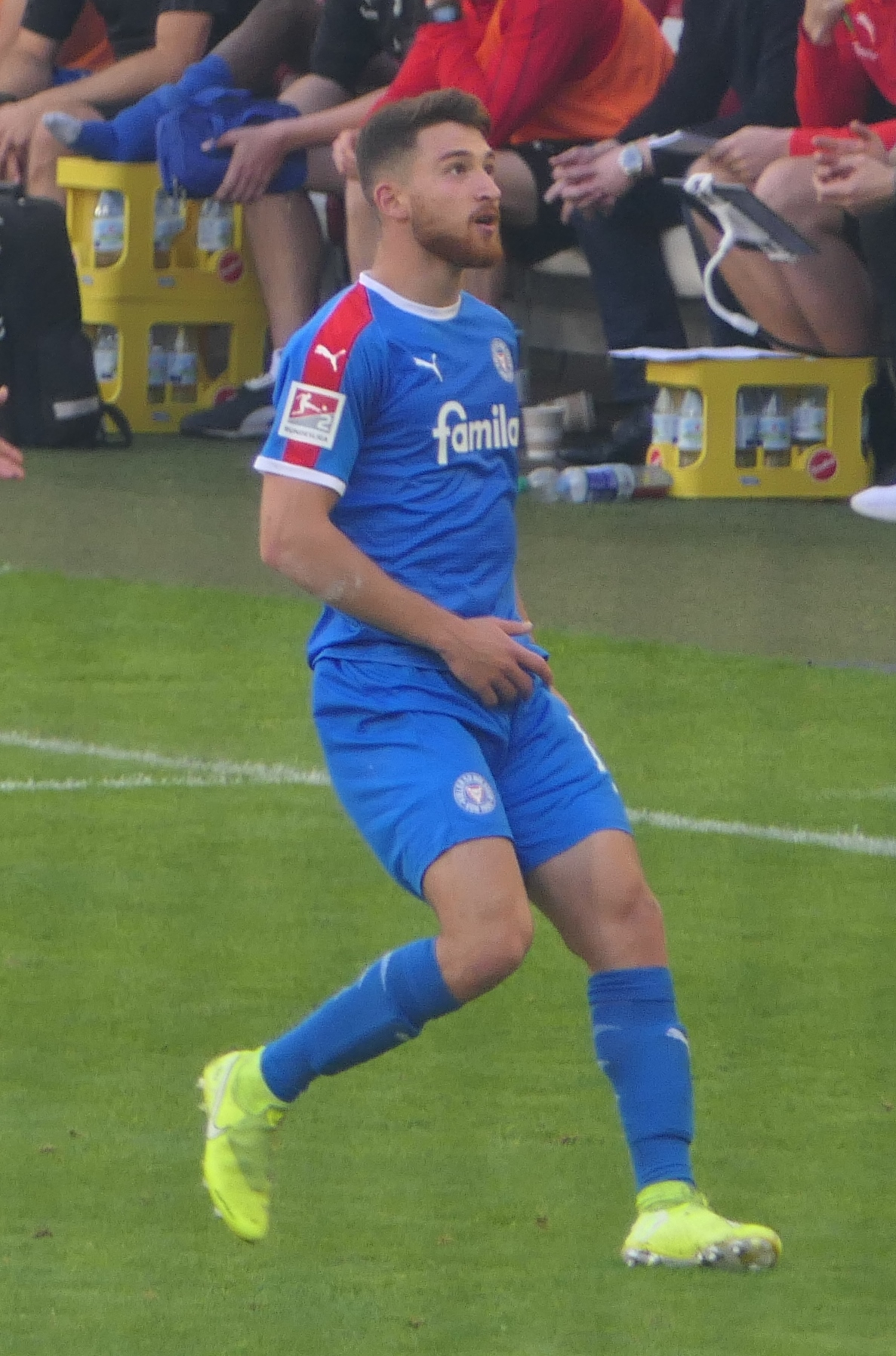 Der Fussballprofi Salih Özcan im Trikot von Holstein Kiel beim Auswärtsspiel gegen den VfB Stuttgart am 20.10.2019.